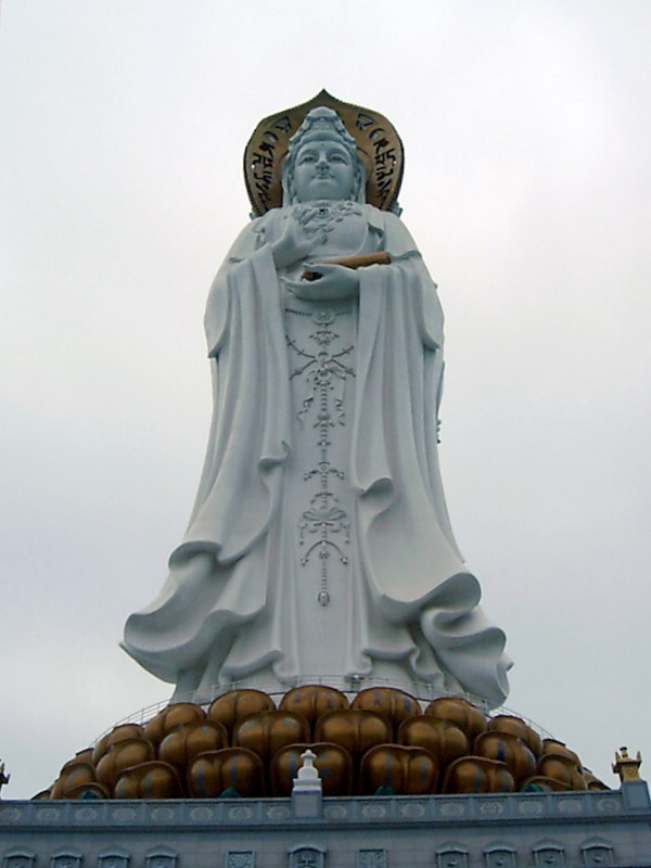 Guanying in Sanya